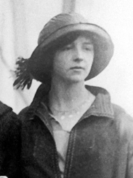 Ève Curie